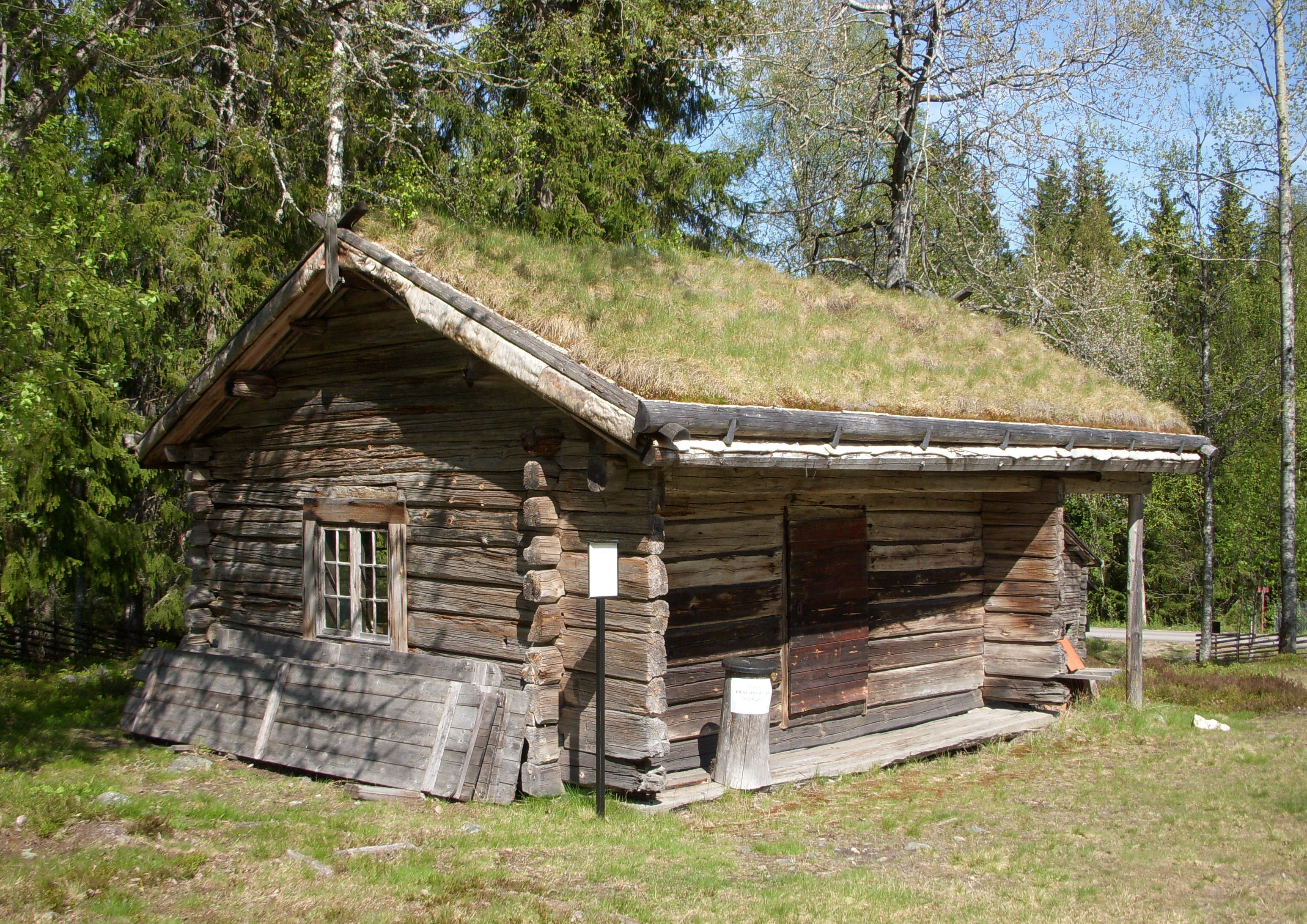 Finngammelgården vid Skattlösberg i Dalarna, "Pörtet"